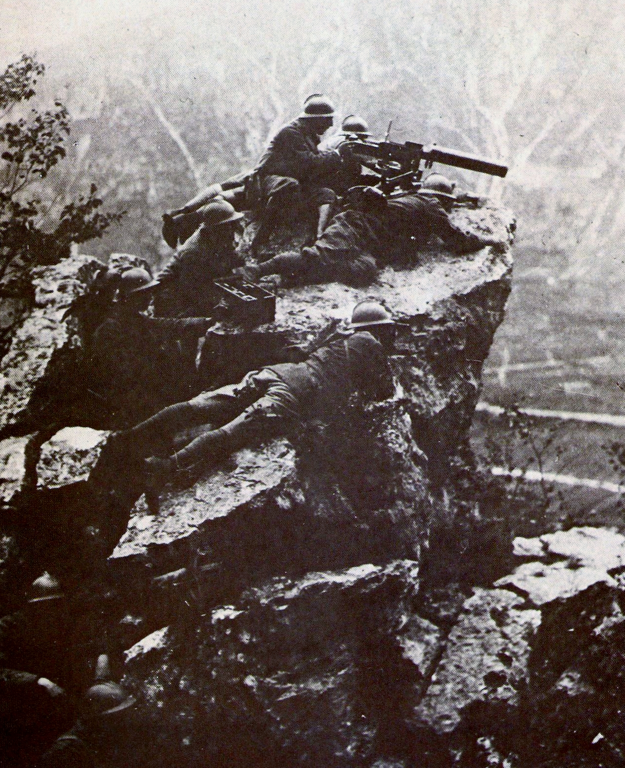 mitraglieri italiani in azione sul monte Grappa Licensing Categoria:Battaglie del fronte italiano Categoria:Italia nella prima guerra mondiale